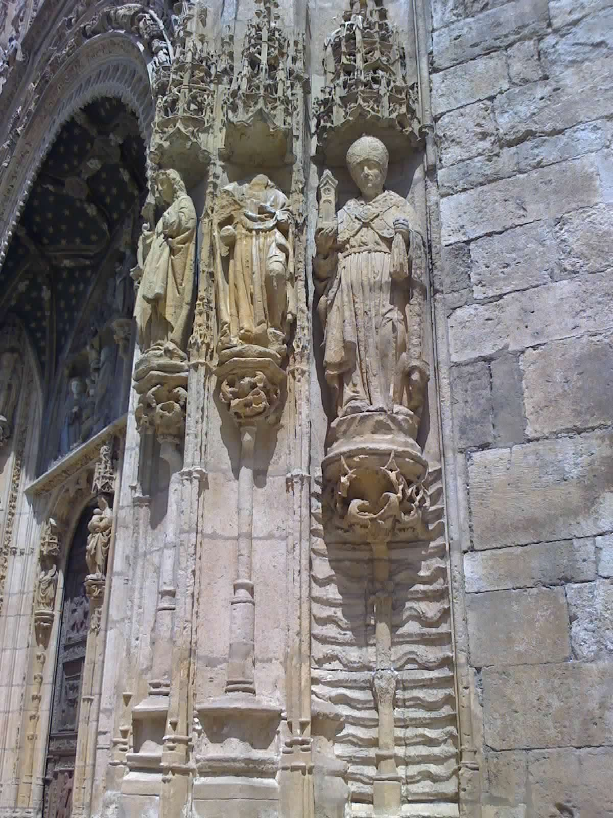 Iglesia de Santa María la Real - Aranda de Duero Detalle del lateral derecho con los cuatro Padres de la Iglesia de Occidente, San Ambrosio, San. Jerónimo, San Agustín y San Gregorio Magno.